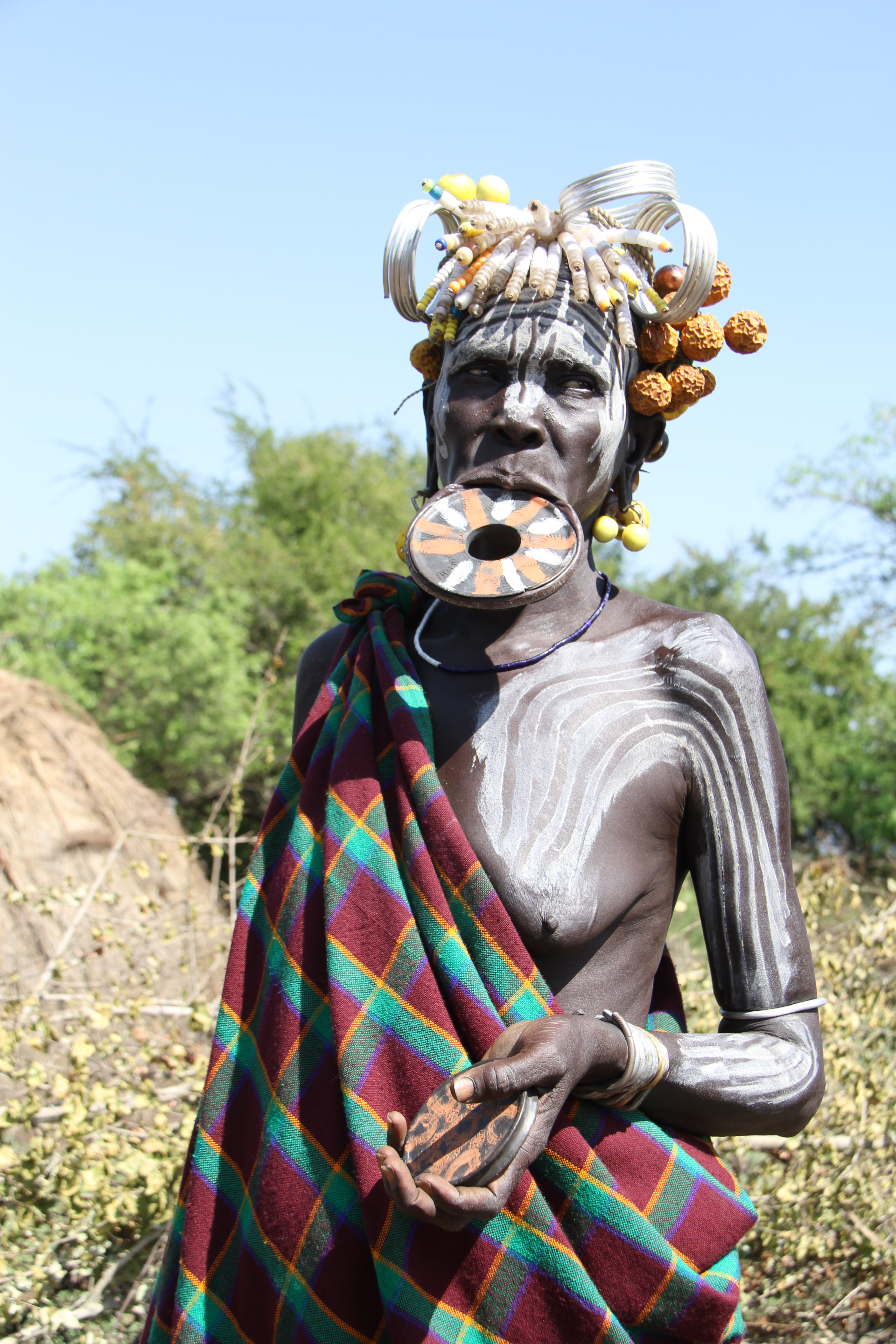 Ethiopie, femme mursi à plateau